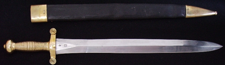 Faschinenmesser Frankreich 1832